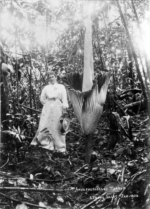 Negatief. Naast de Rafflesia waren er andere plantensoorten die Benkoelen voor toeristen, natuurbeschermers en andere tot een interessante streek maakten. Het ging daarbij onder meer om de Amorphophallus van de foto en de vele soorten orchideeën. In 1932 had de pluk en verkoop van orchideeën zo'n omvang aangenomen dat voor uitroeiing gevreesd moest worden. Resident Groeneveldt wilde deze ontwikkeling een halt toe roepen en stelde voor van het grote moeras van Doesoen Besar een natuurmonument te maken. Om zijn argumenten kracht bij te zetten, liet hij de Gouverneur-Generaal de trieste resten zien van de eens zo trotse orchideeënvegetatie. (P. Boomgaard, 2001). Een Europese vrouw poseert naast een Amorphophallus titanum te Lebong Soelit, Benkoelen, Zuid-Sumatra